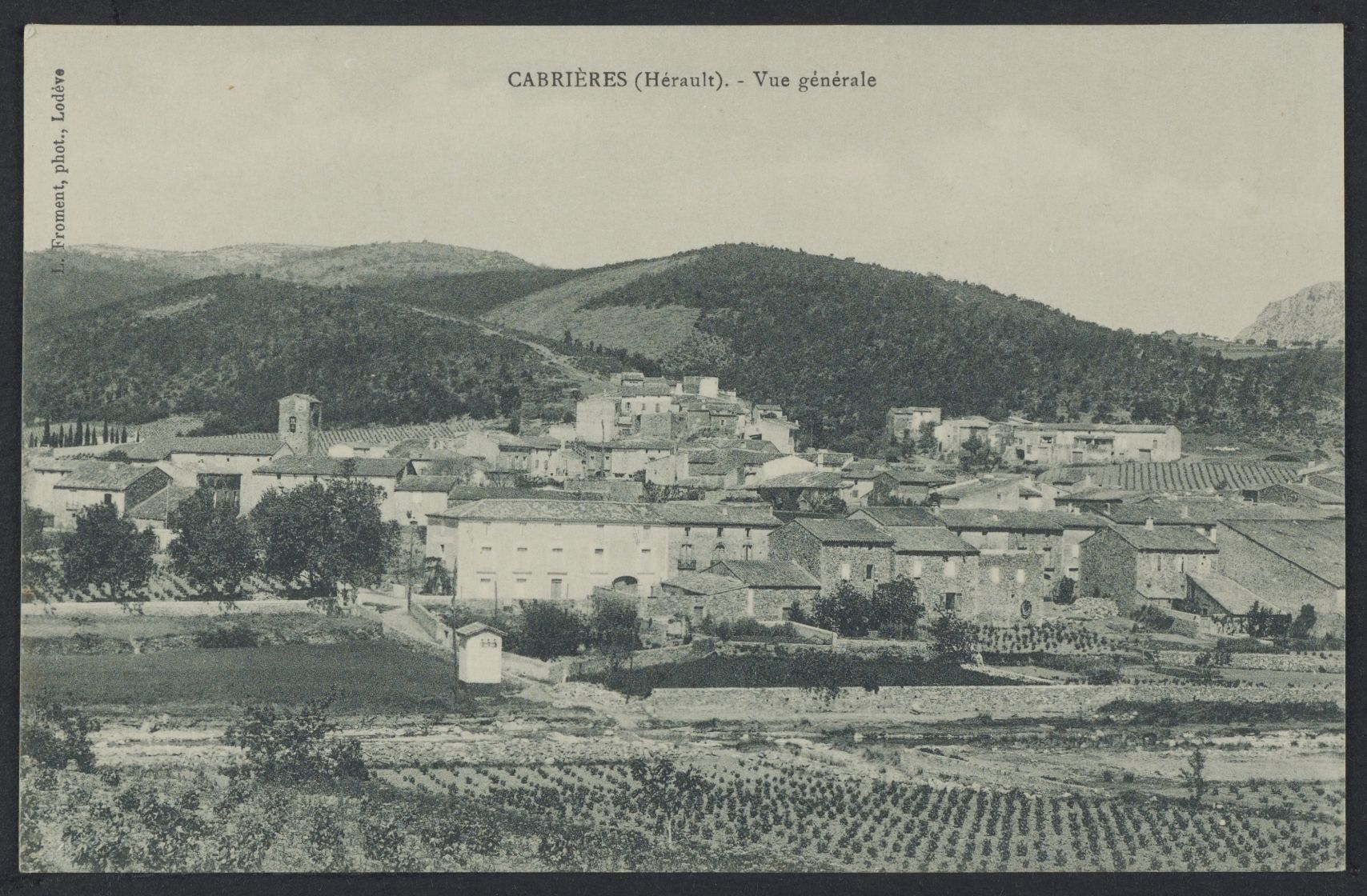 Cabrières. - Vue générale ; carte postale, 1ère moitié du XXe siècle